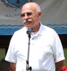 Martonyi János (politikus)